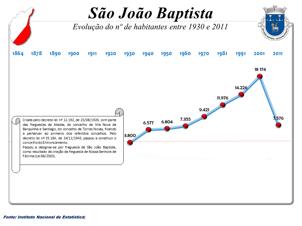 Evolução da População